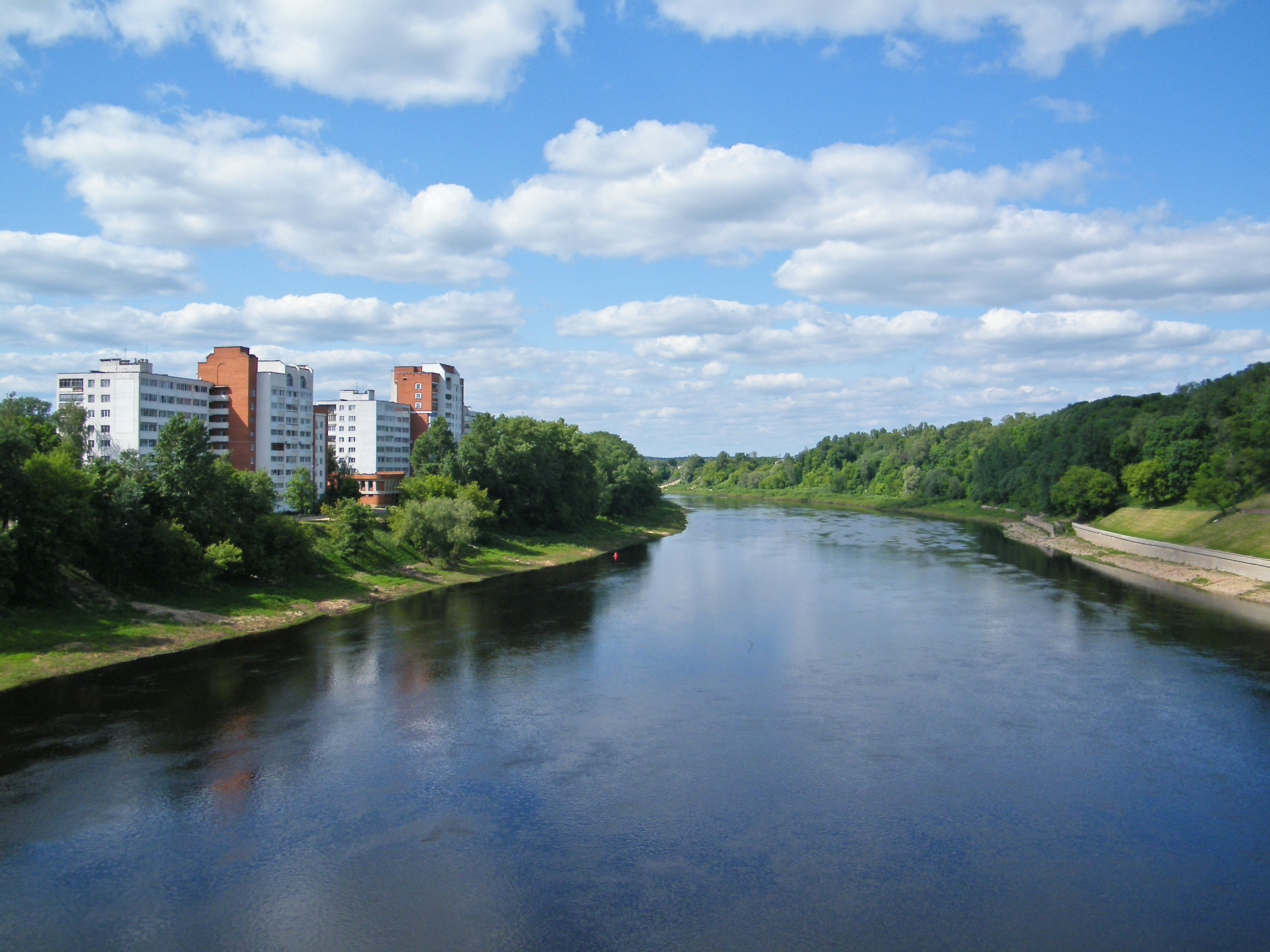 Западная Двина в районе Кировского моста